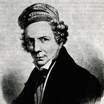 Portrait Otto Magnus von Stackelbergs